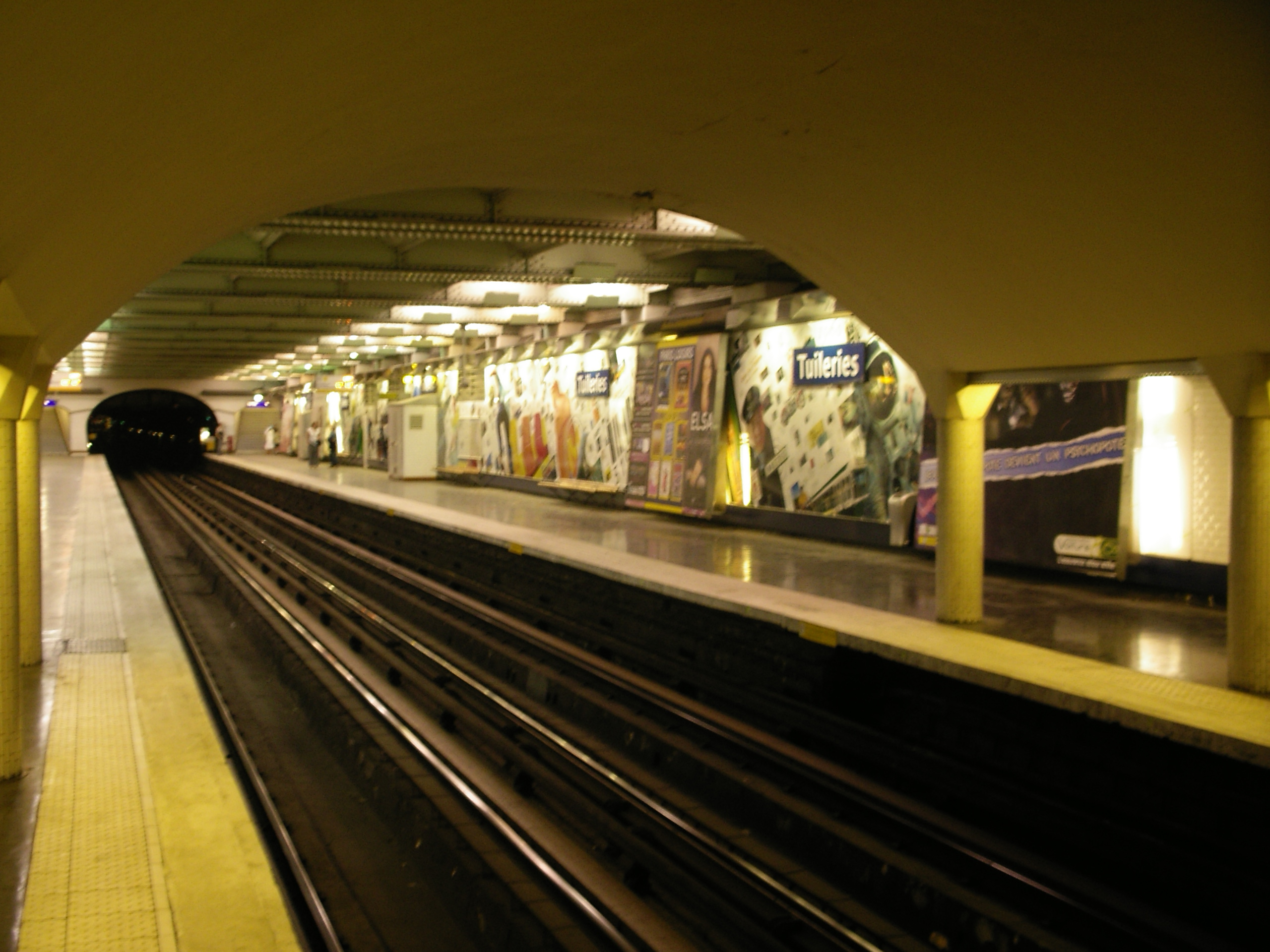 zelfgemaakte foto